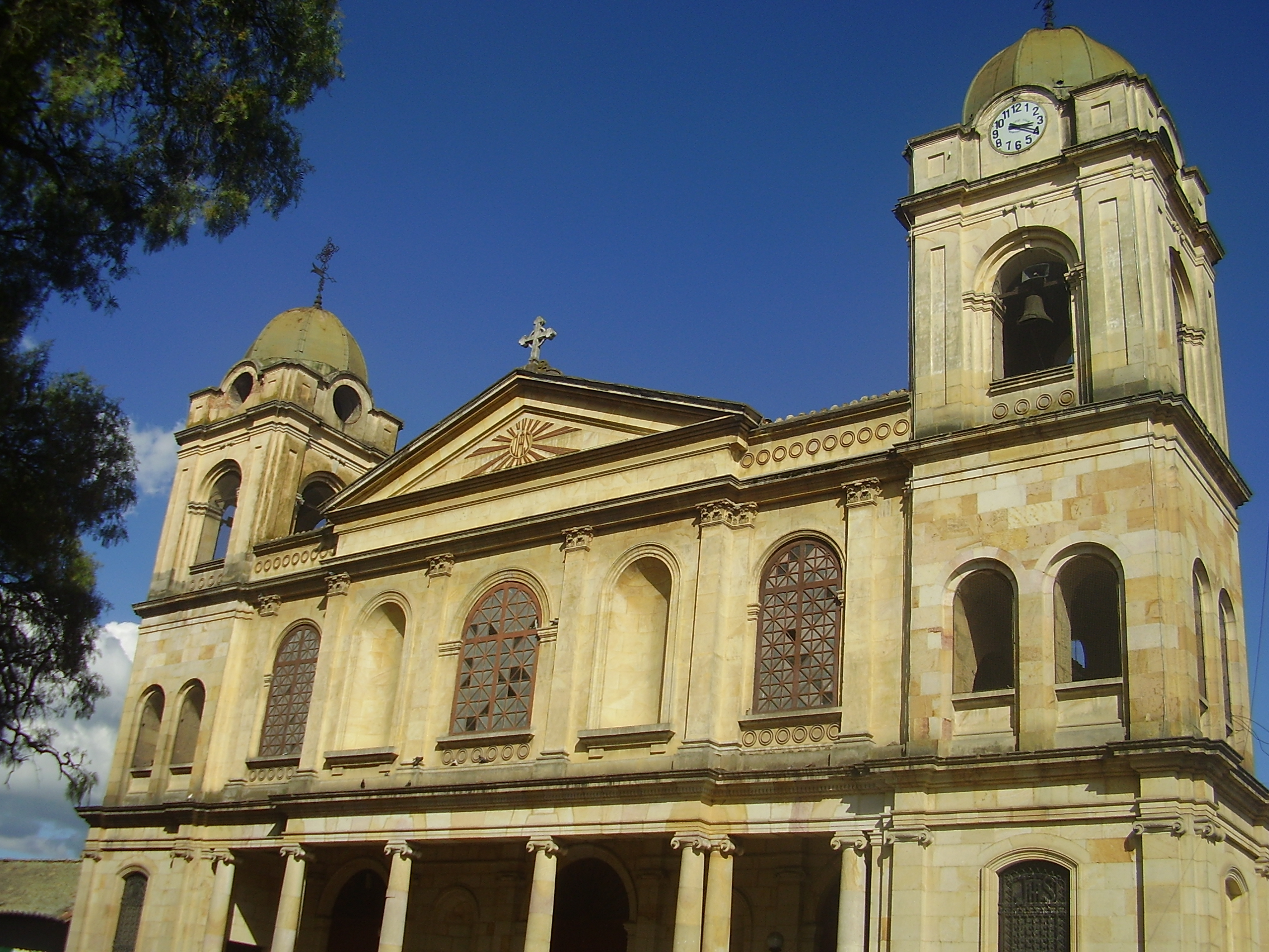 Catedral del Municipio de Madrid Cundinamarca